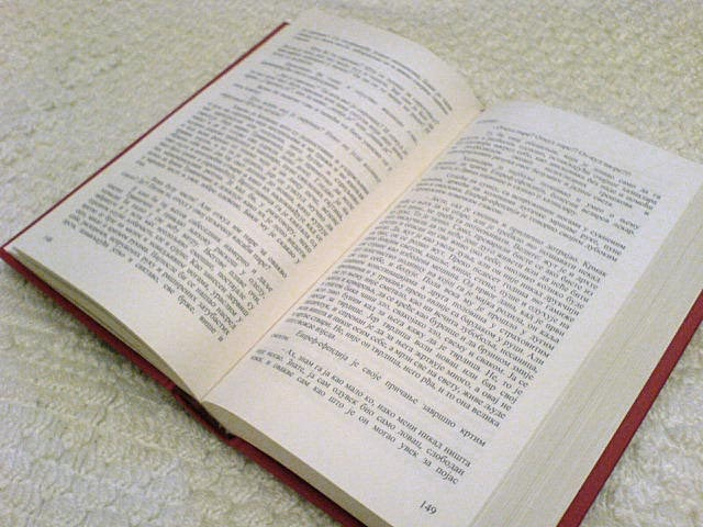 Open book. Own work.